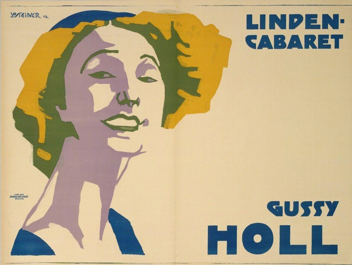 Linden-Cabaret - Gussy Holl, 1912. Farblithographie von Jo Steiner. 720 mm x 950 mm, Kunstanstalt Arnold Weylandt, Berlin (Druck)